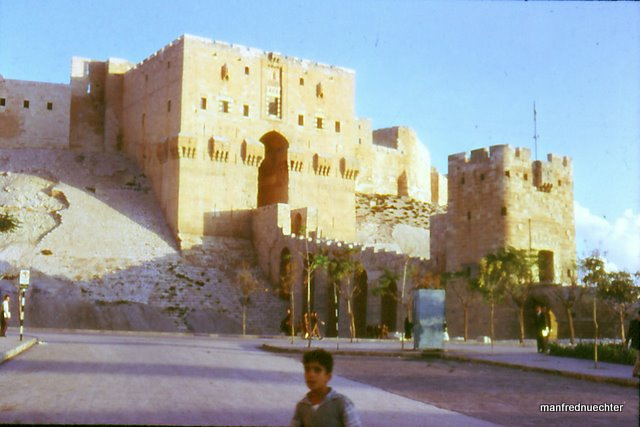 Syrien 1961 - Zitadelle von Aleppo